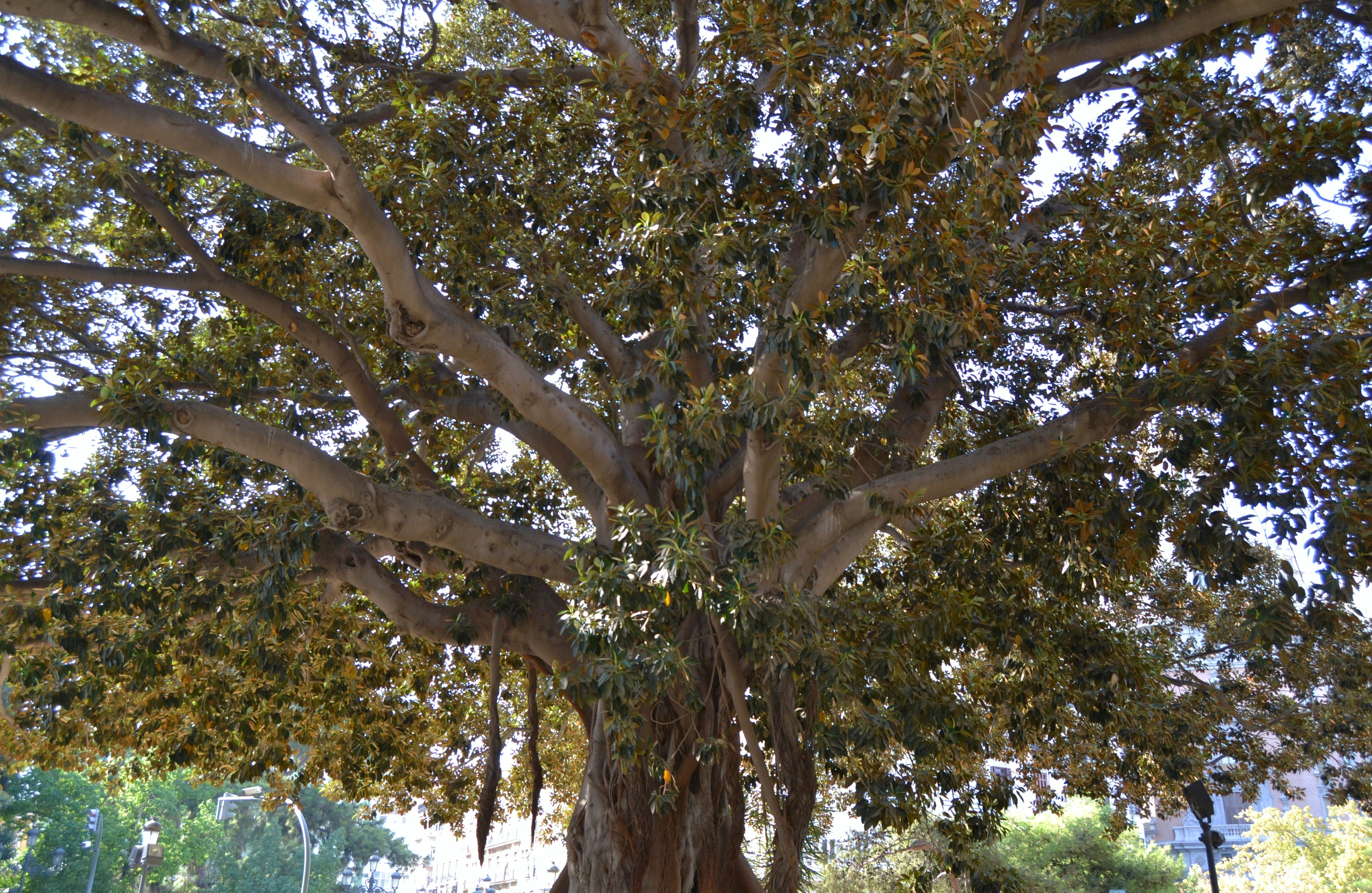 Branques del ficus de la Glorieta de València.